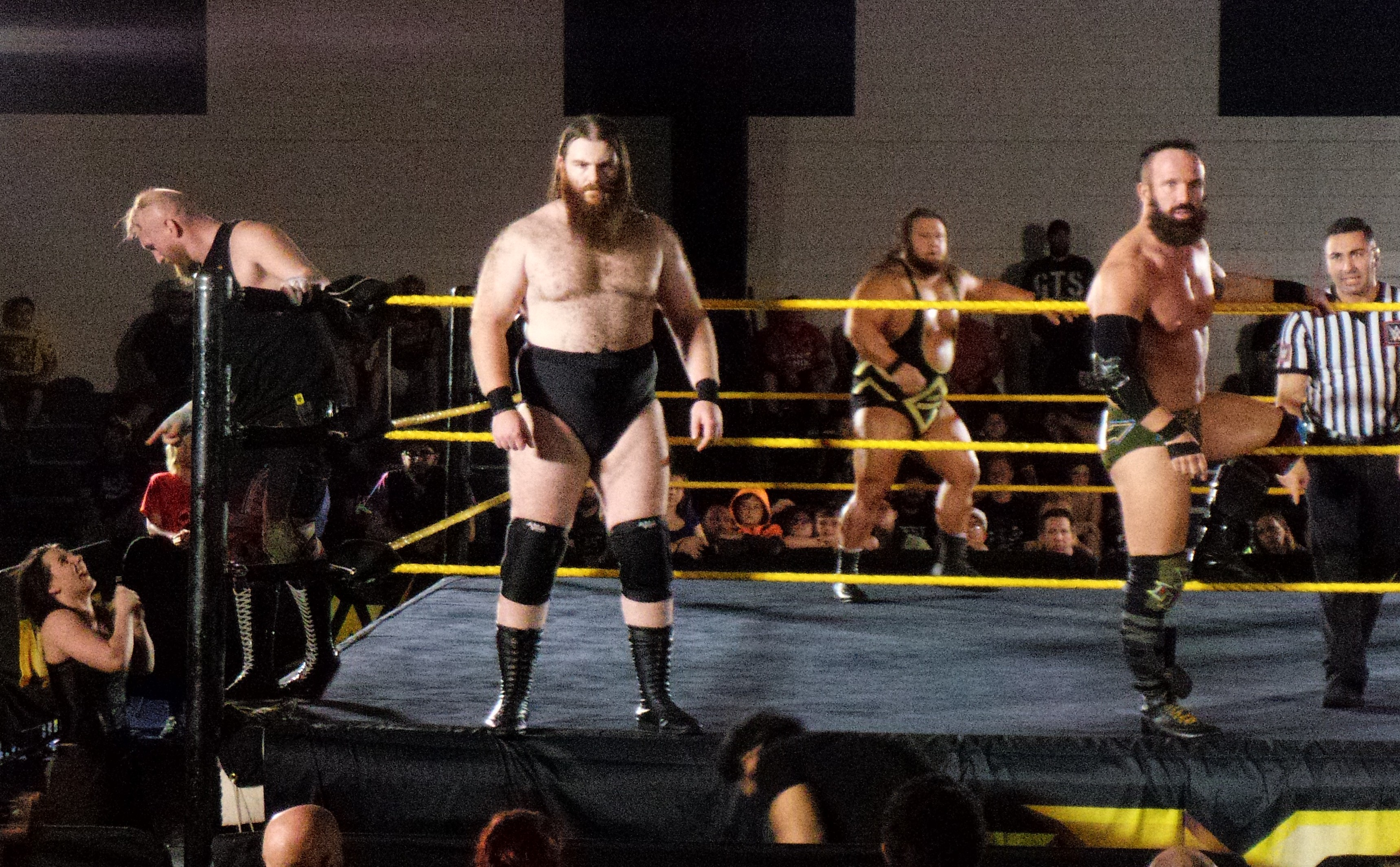 P_20170505_212447_003